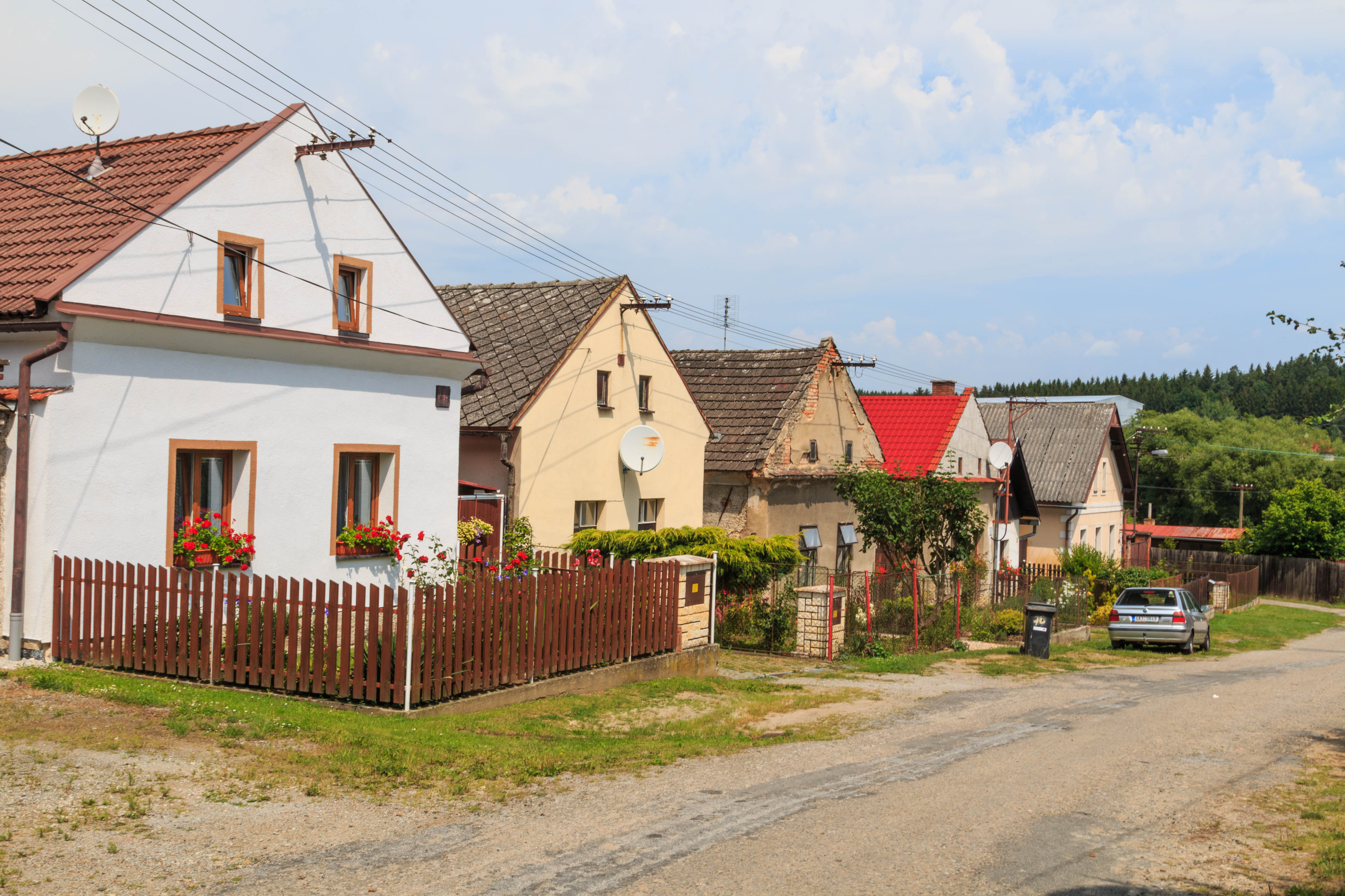 Mírovka - čp. 40